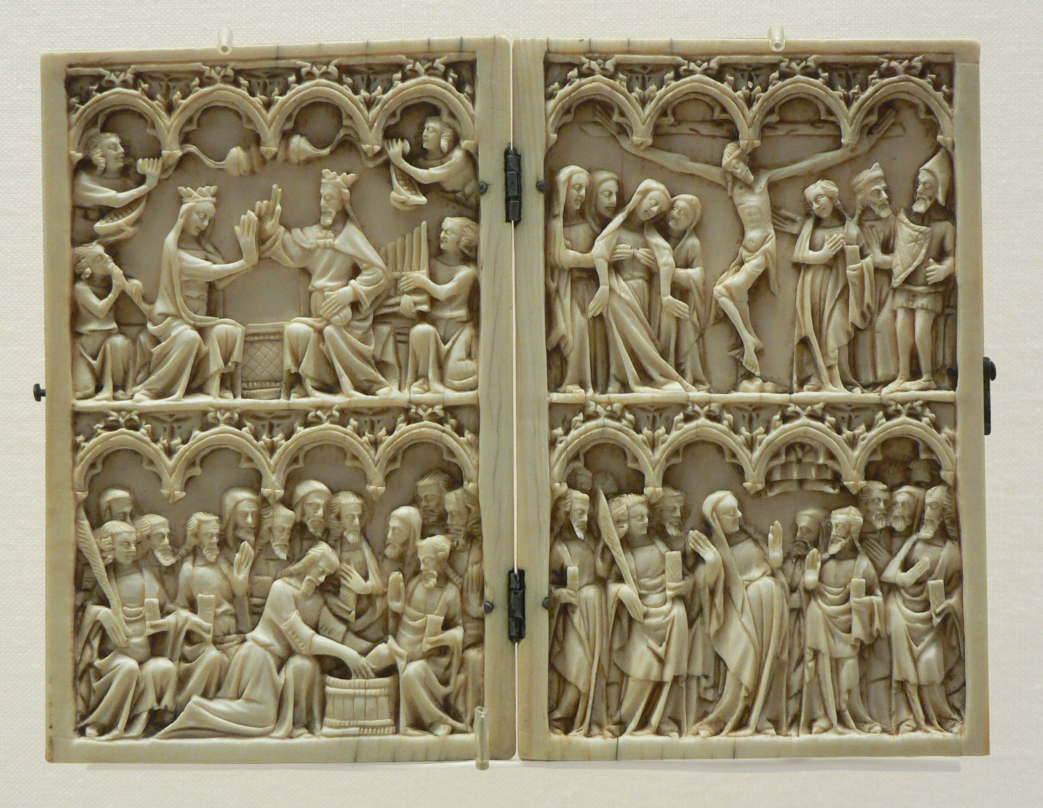 Dyptique sur ivoire représentant des scènes de la vie de Jesus Christ, France, XIVème siècle. Photographié à La Fondation Calouste Goulbenkian à Lisbonne, Portugal.